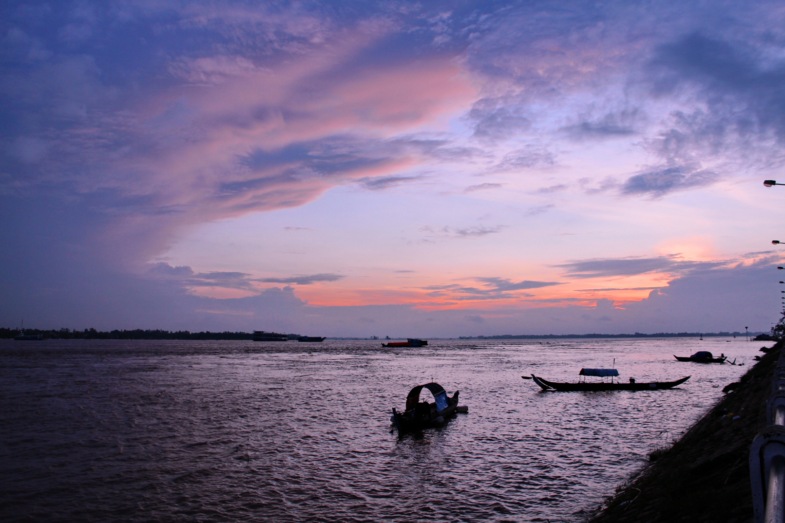 Binh Minh Bo song tan chau, tp. Tan chau, Angiang,29/10/2013 dyt